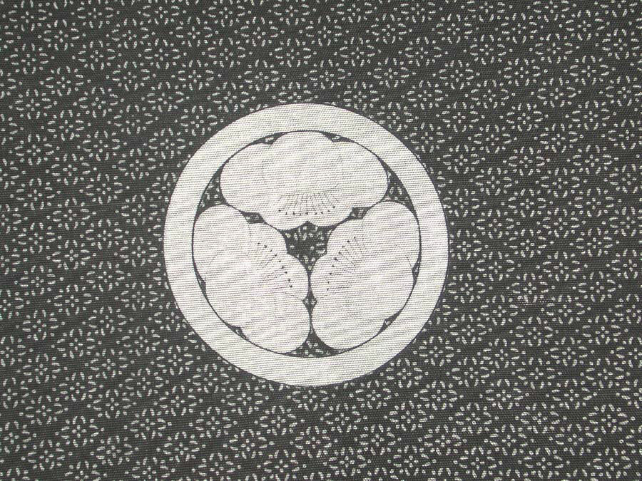 Japan; Kosode; Costumes